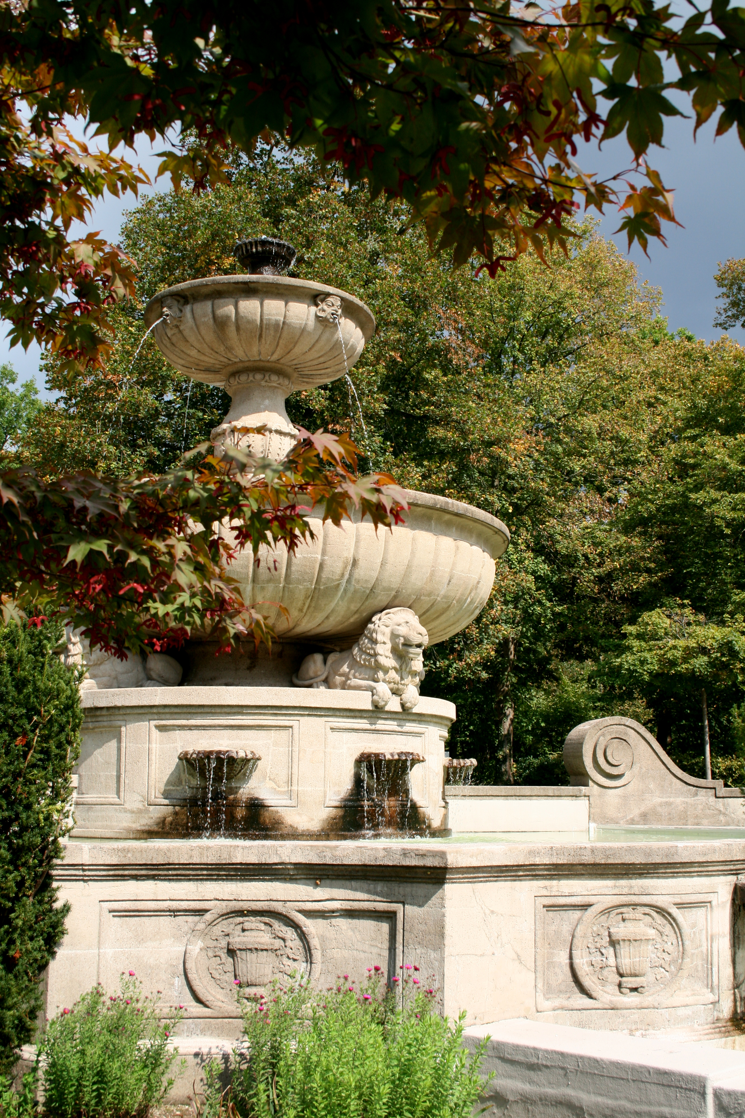 Löwenbrunnen auf dem Hauptfriedhof